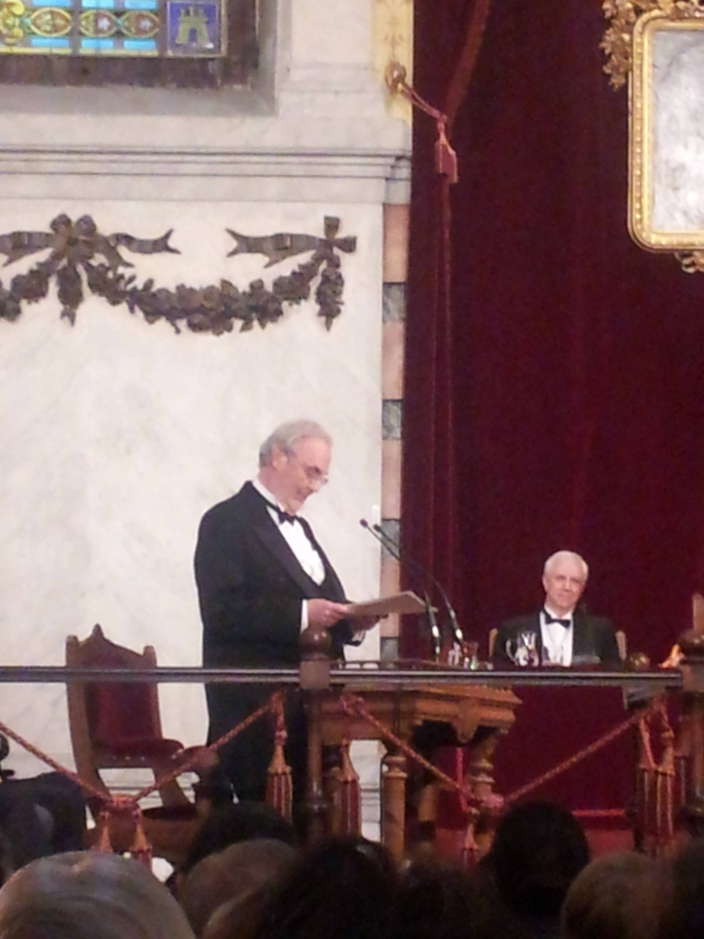 Recepción pública a Manuel Gutiérrez Aragón el 24 de enero de 2016 en la Real Academia Española